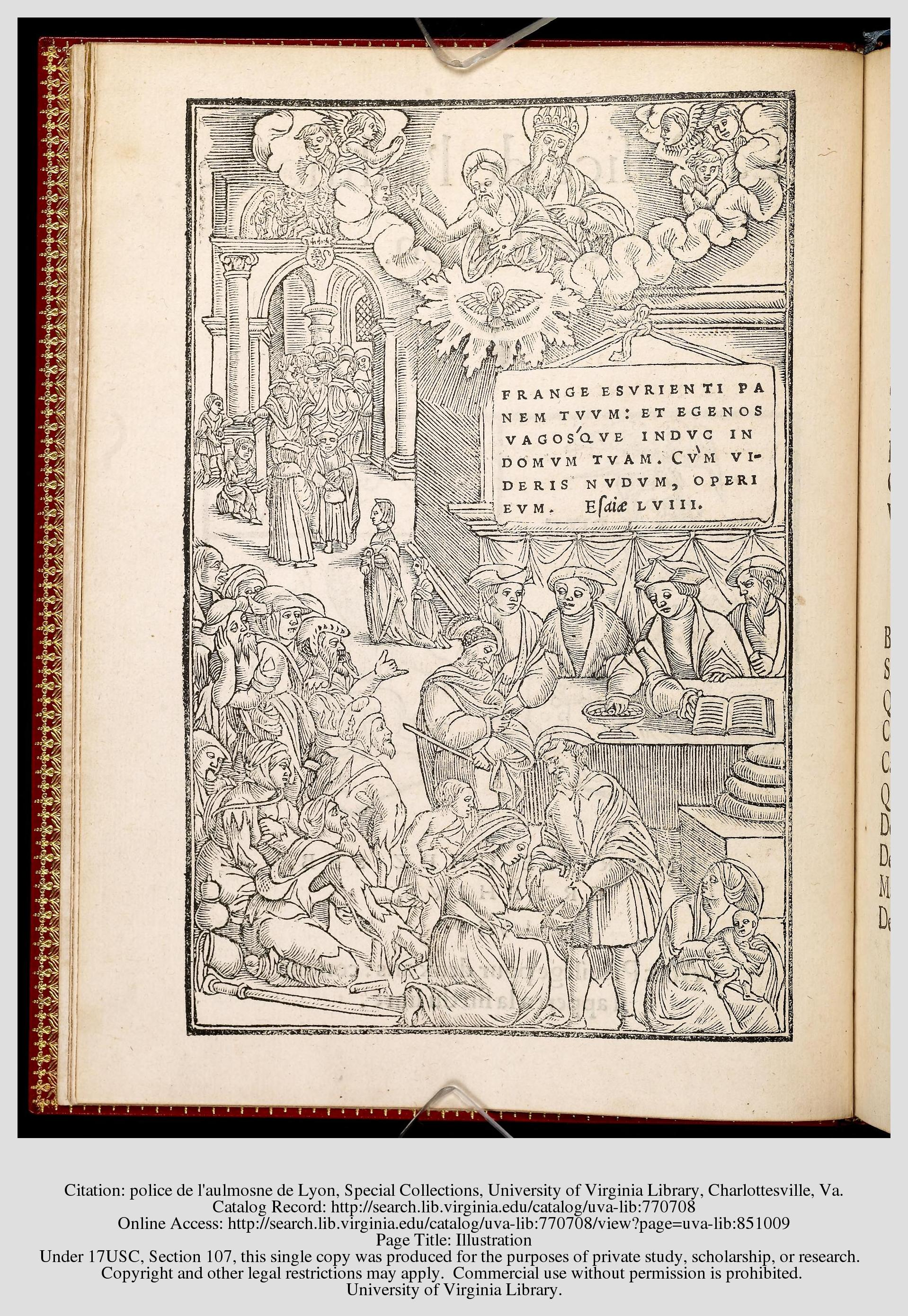 Frontispice de l'ouvrage La police de l'aulmosne de Lyon publié chez Sébastien Gryphe, 1539., University of Virginia Library